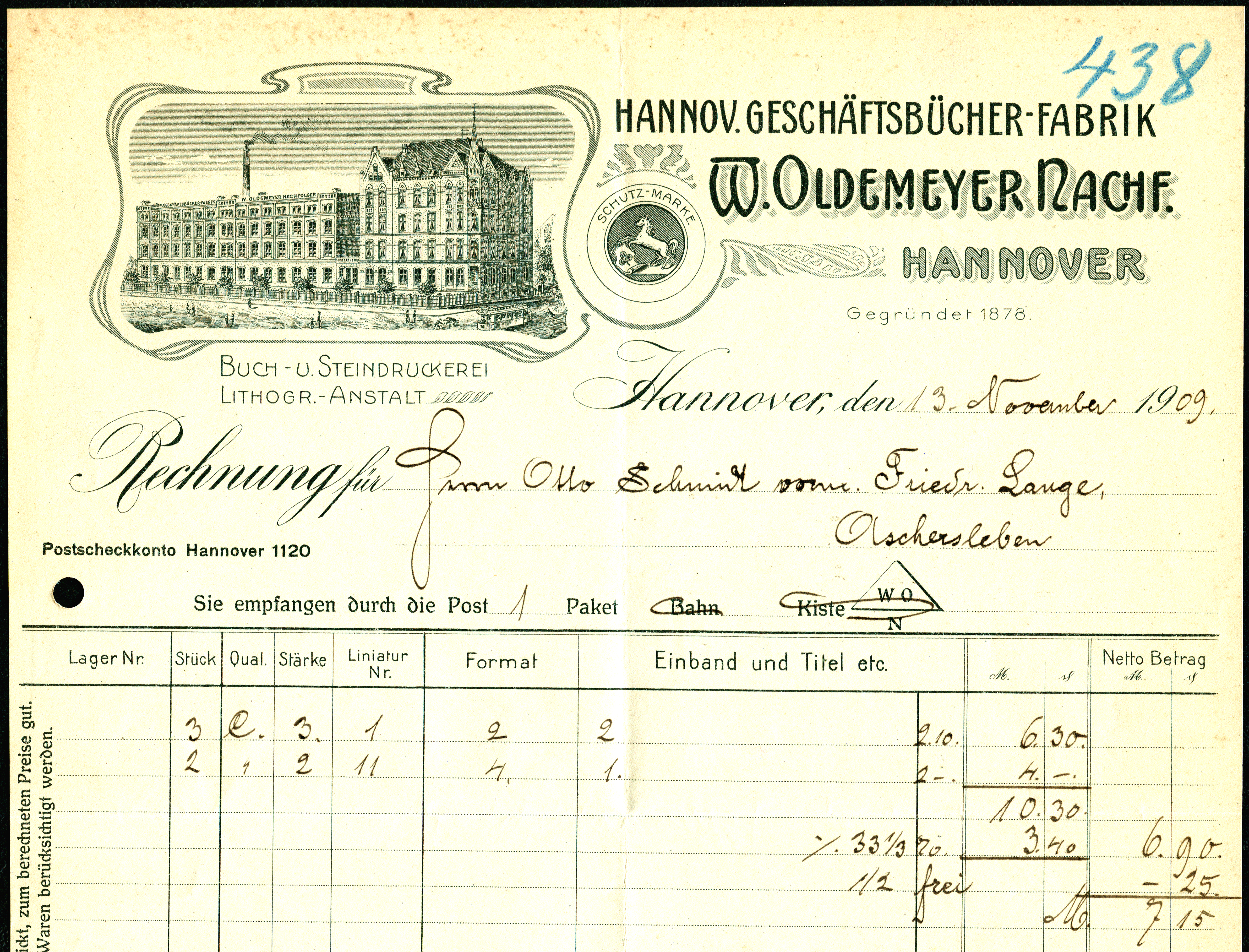 Kopf eines Rechnungsbogen der Hannoverschen Geschäftsbücherfabrik W. Oldemeyer Nachfolger" mit einem Stich des Fabrikgebäudes, davor eine Straßenecke mit elektrischer Straßenbahn und Menschen. Das 1878 gegründete Unternehmen, Buch- und Steindruckerei sowie Lithographische Anstalt sandte ihre Rechnung an "Herrn Otto Schmidt" (vormals Friedrich Lange) in Aschersleben, Taubenstraße 8. Das Blatt ohne Wasserzeichen ist etwas größer als DIN A4 und rückseitig blanco.